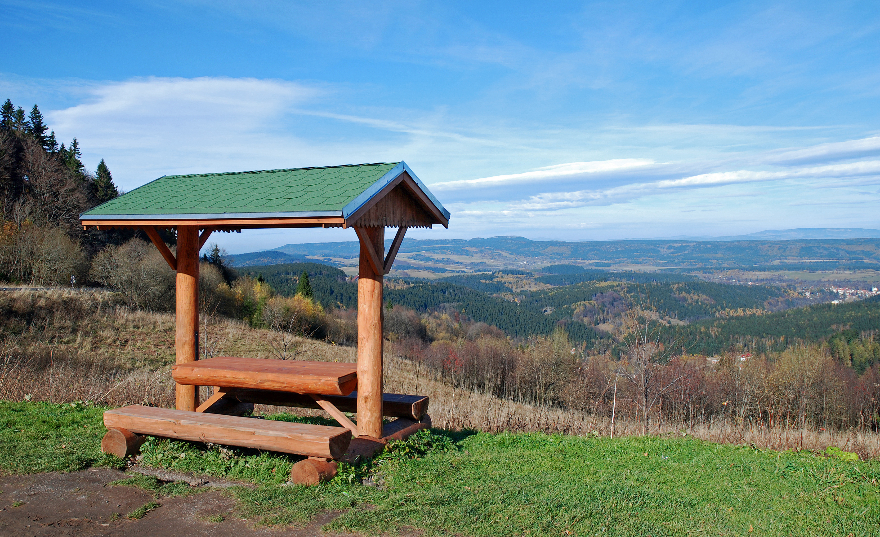 Zieleniec, wiata przy szlaku turystycznym, miejsce odpoczynku dla turystów